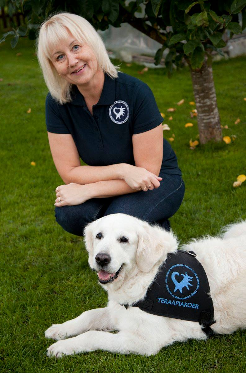 Eesti Abi- ja Teraapiakoerte Ühingu auliige Meeli Eismann ja pensionipõlve veetev, Viljandimaa esimene teraapiakoer Debby